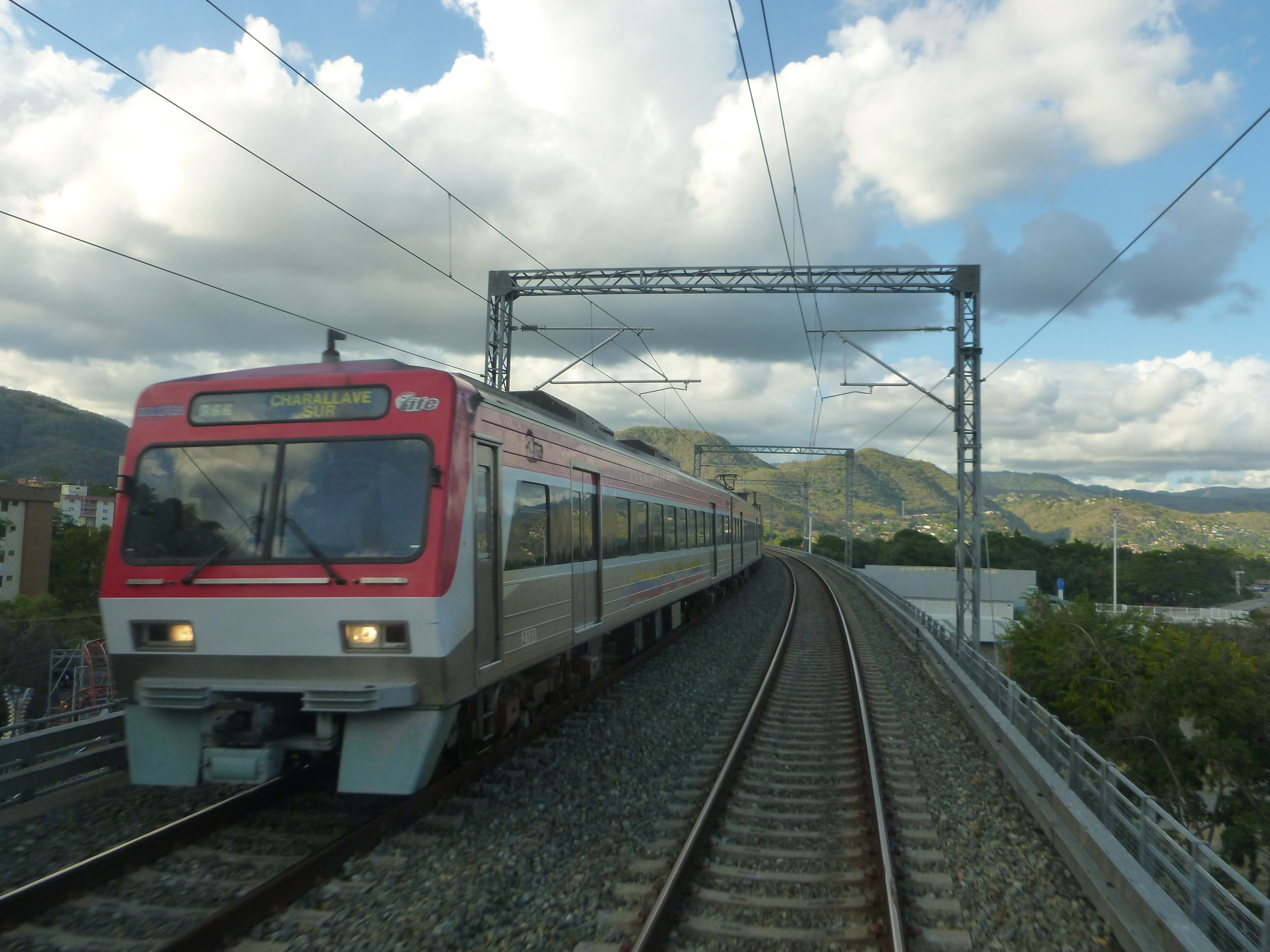 Unidad eléctrica múltiple (EMU) en circulación en el tramo Ezequiel Zamora Venezuela.